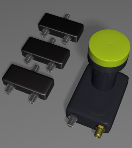 W działaniu przypomina konwerter QUAD jednak potrafi przesłać sygnał SAT po jednym kablu. Istnieje kilka wersji tego konwertera : obsługujący 4 odbiorniki na jednym kablu , obsługujący 4 odbiorniki na jednym kablu + dodatkowe wejście na odbiornik który nie obsługuje technologi unicable. obsługujący 4 odbiorniki na jednym kablu + sumujący sygnał z anteny naziemnej. Grafika przedstawia właśnie ten typ konwertera. Zaletą tego rozwiązania jest użycie tylko jednego kabla zamiast czterech. Wadami koszty(ale niższe niż w przypadku konwertera multiband) , problemy z działaniem , niewiele odbiorników obsługuje technologię unicable. Oprócz konwertera w zestawie UNICABLE znajdują się 3 separatory sygnału.